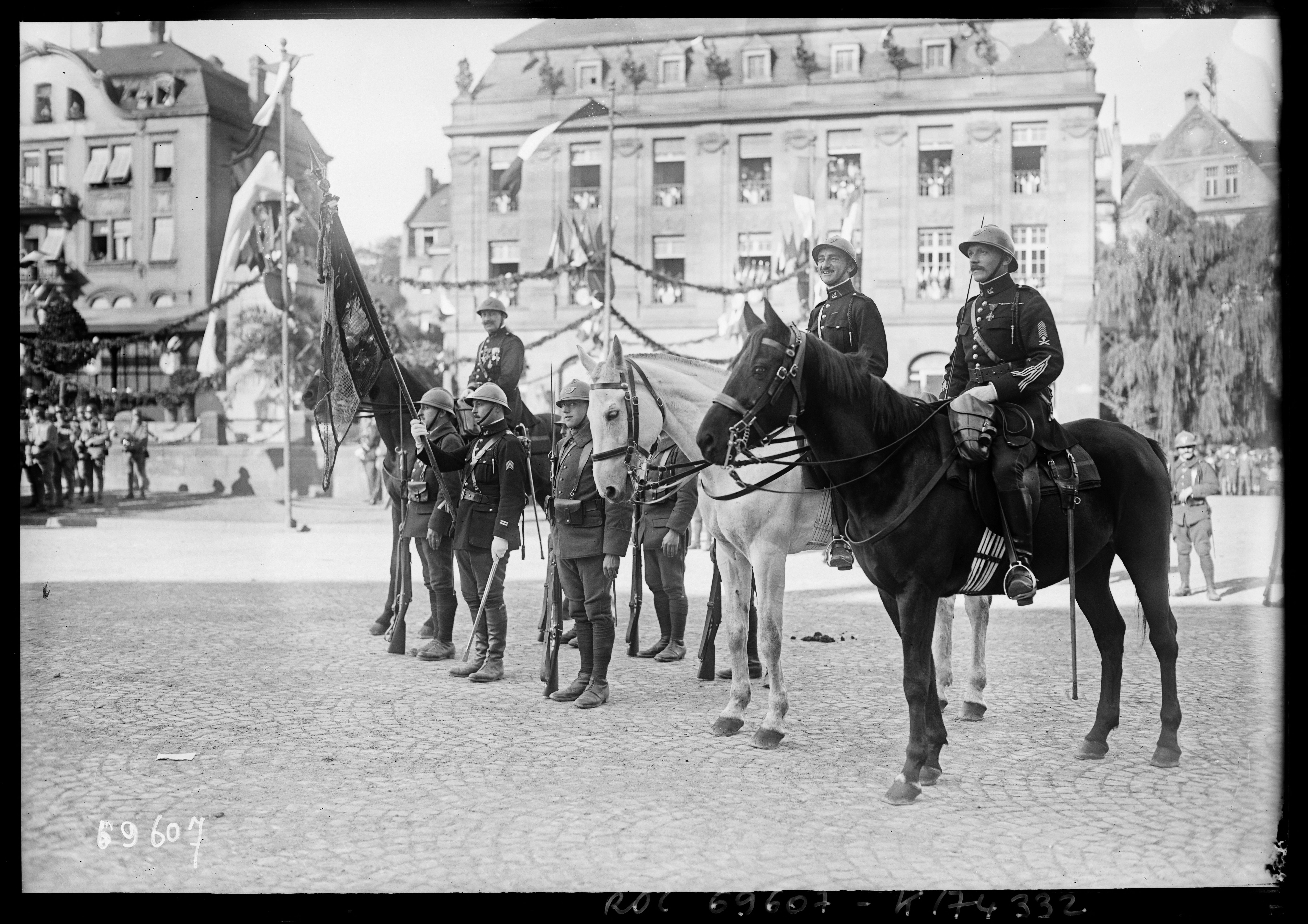 Metz, 16/10/21, inauguration du monument Déroulède (actuelle place Raymond Mondon), drapeau du 8e bataillon de chasseurs : [photographie de presse] / [Agence Rol]